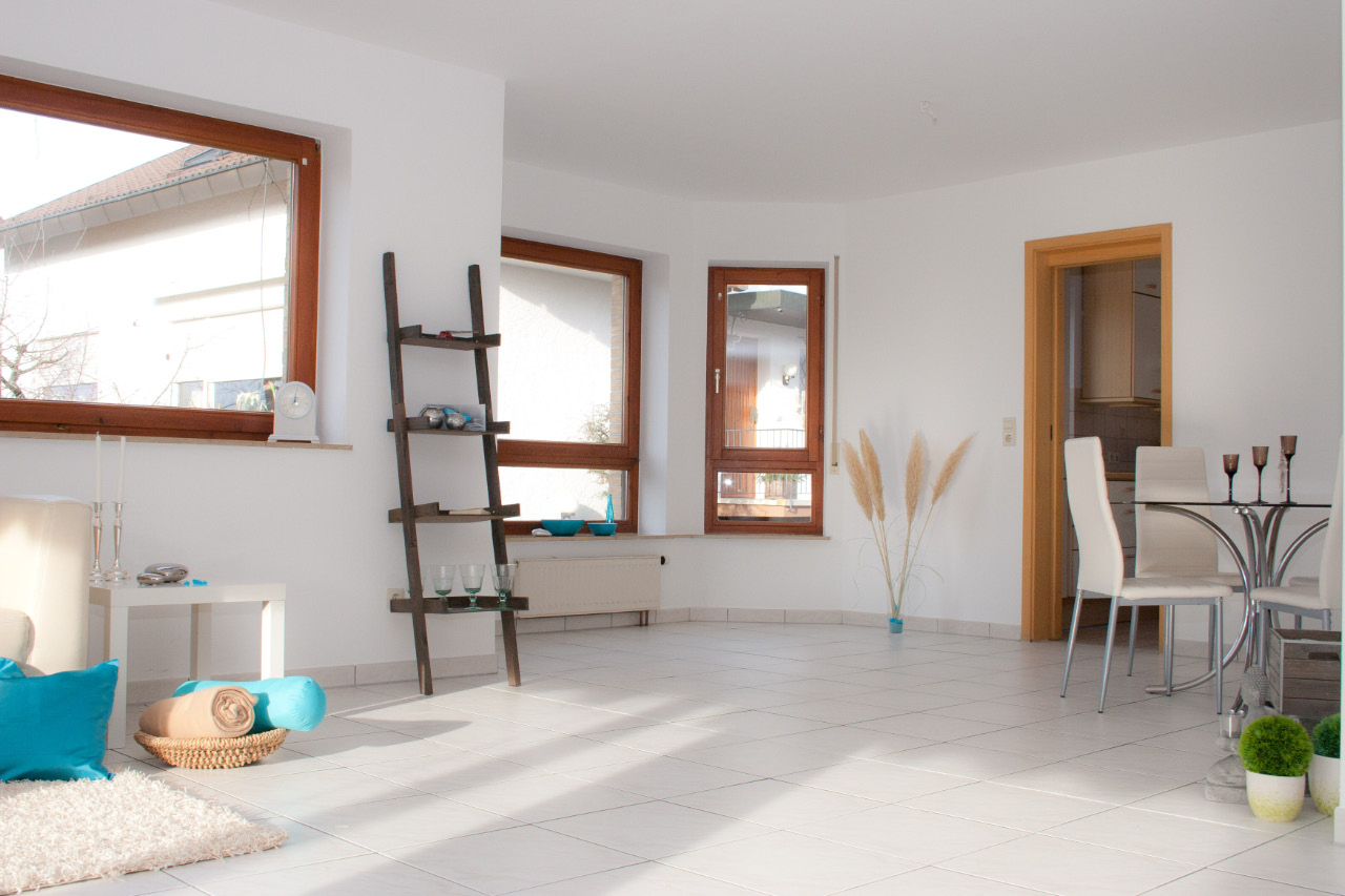 Eine Wohnung im unbewohnten Zustand, jedoch durch Home Staging wird dem Interessenten eine höhere Wertigkeit vermittelt